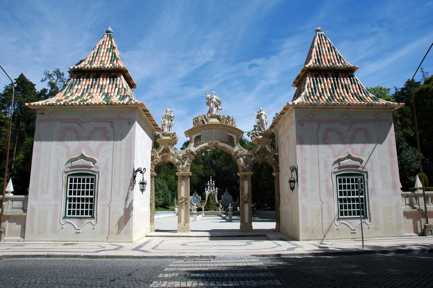 Jardim da Sereia, Coimbra, Portugal